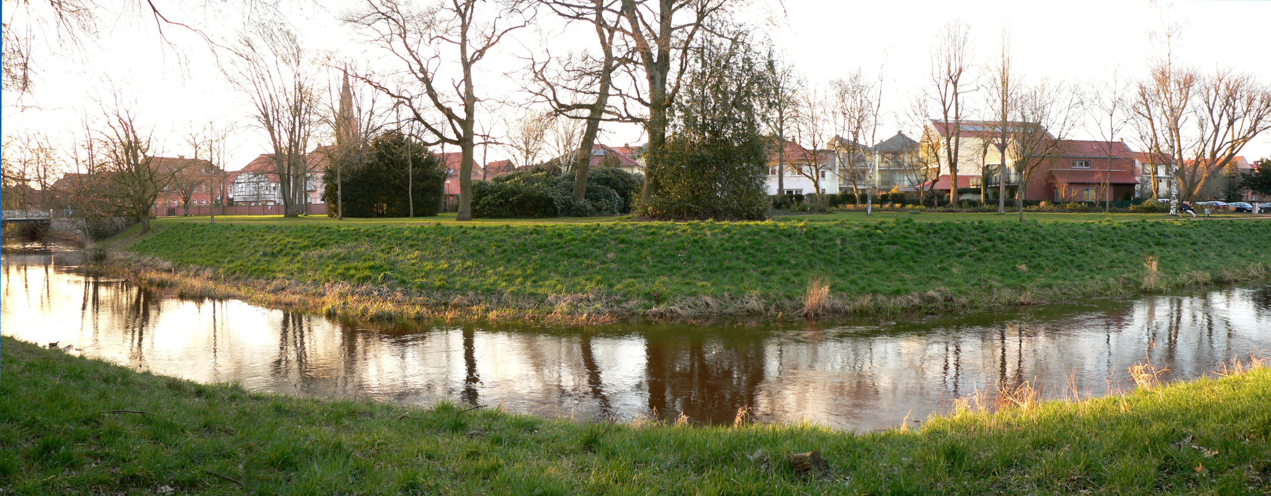 Spitzwinkliges Gelände am Flusslauf der Aue bzw. des Steinhuder Meerbachs der früheren Bastion Scharfes Eck der Festung Nienburg